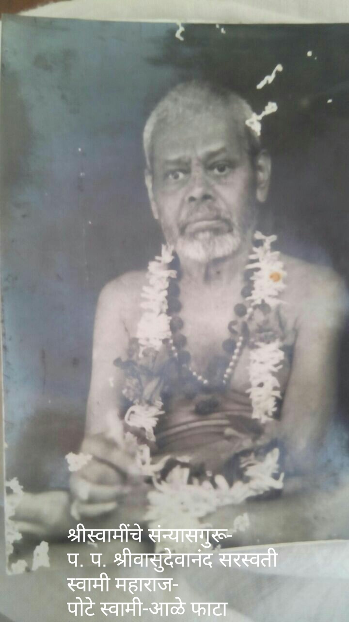 हे श्रीस्वामींचे संन्यासगुरू होत.परमहंस परिव्राजकाचार्य श्रीमत् वासुदेवानंद सरस्वती ( पोटे) स्वामी (पुणे - नाशिक रोडवरील आळे येथील पोटे स्वामी)कडून श्रीप्रज्ञानानंद सरस्वती स्वामी महाराजांना संन्यास-दीक्षा प्राप्त झाली.